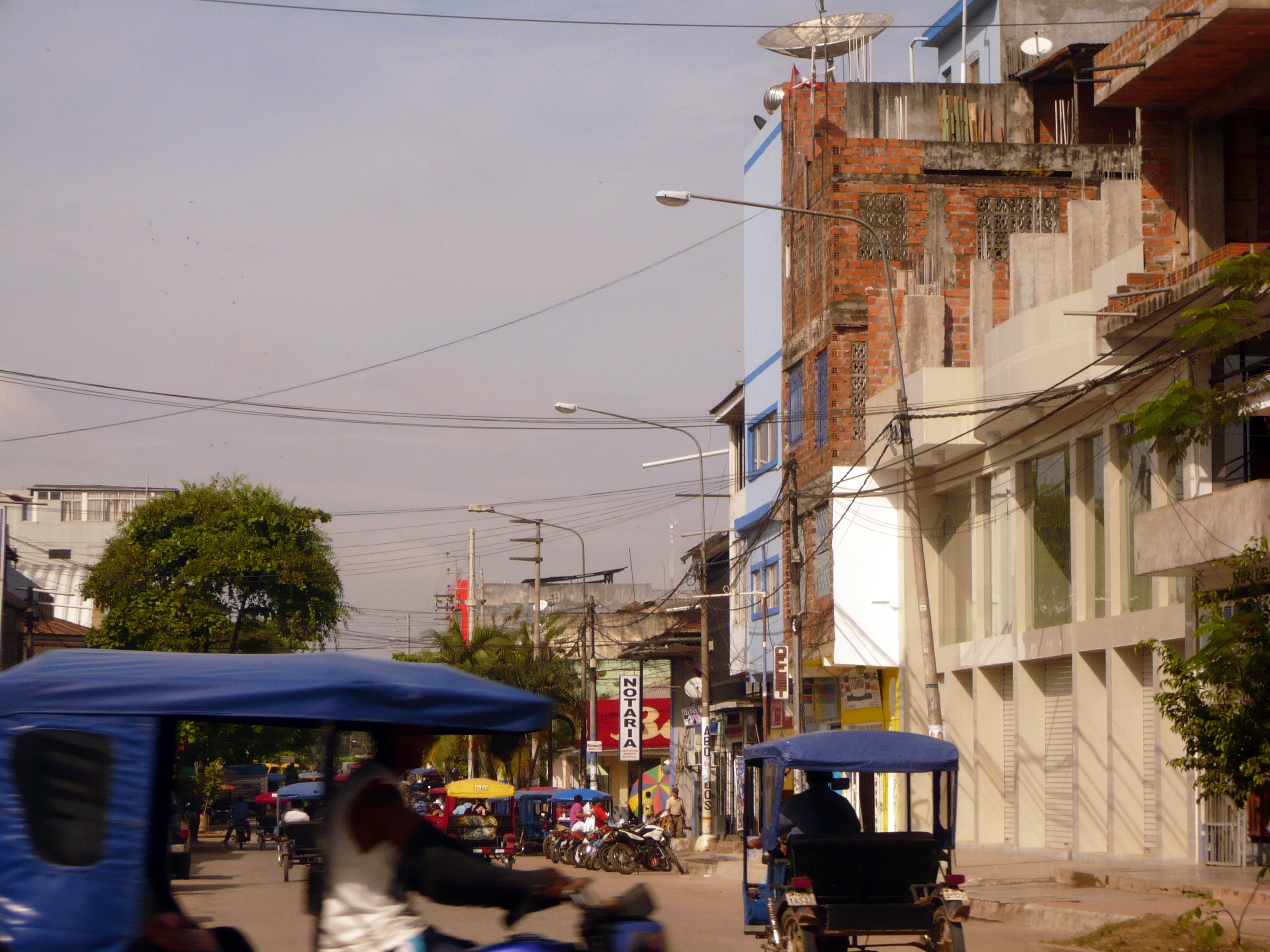 La sede de la cadena Ucayalina de Televisión en jirón Raimondi, Pucallpa.